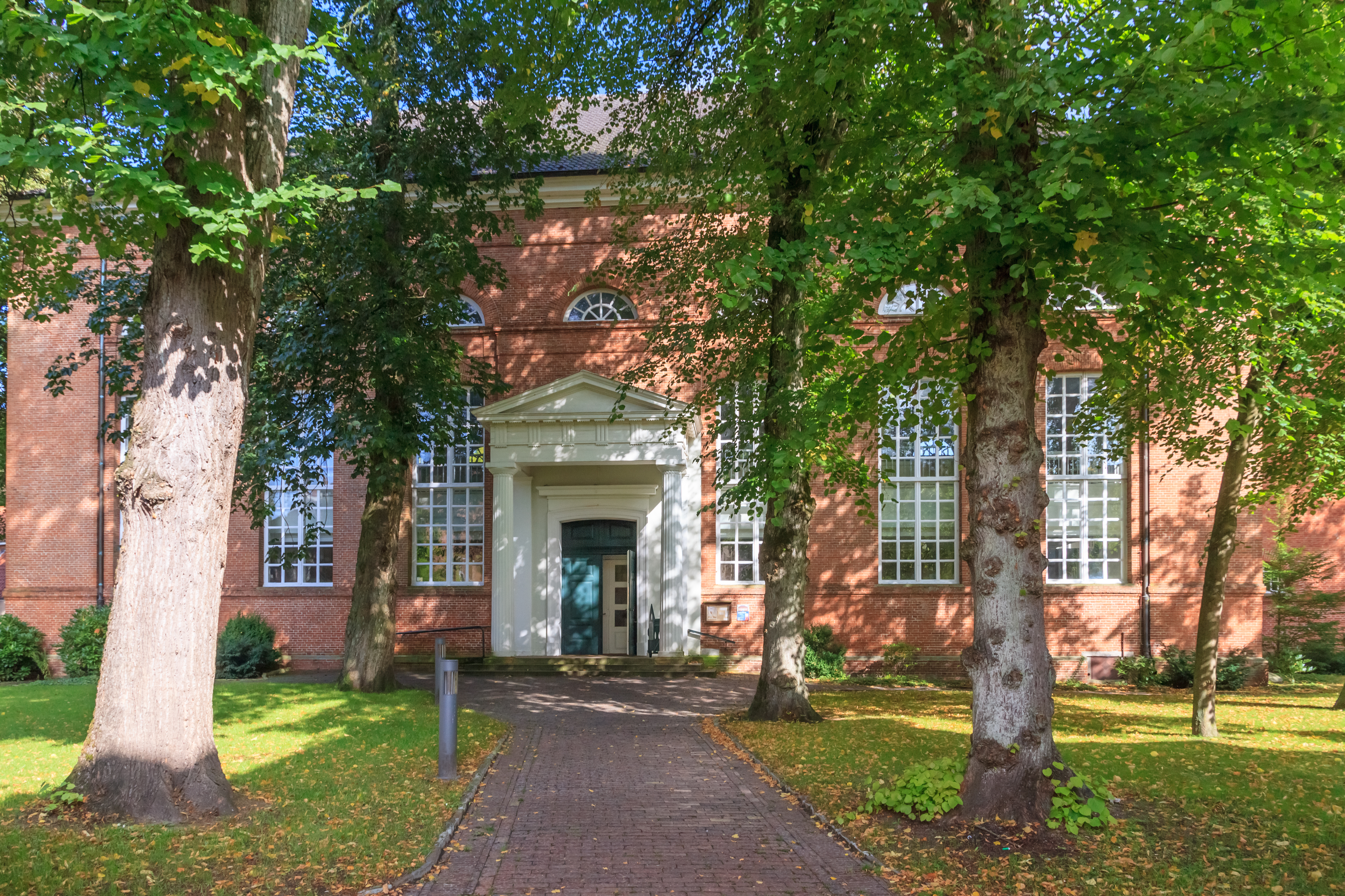 Lambertikirche